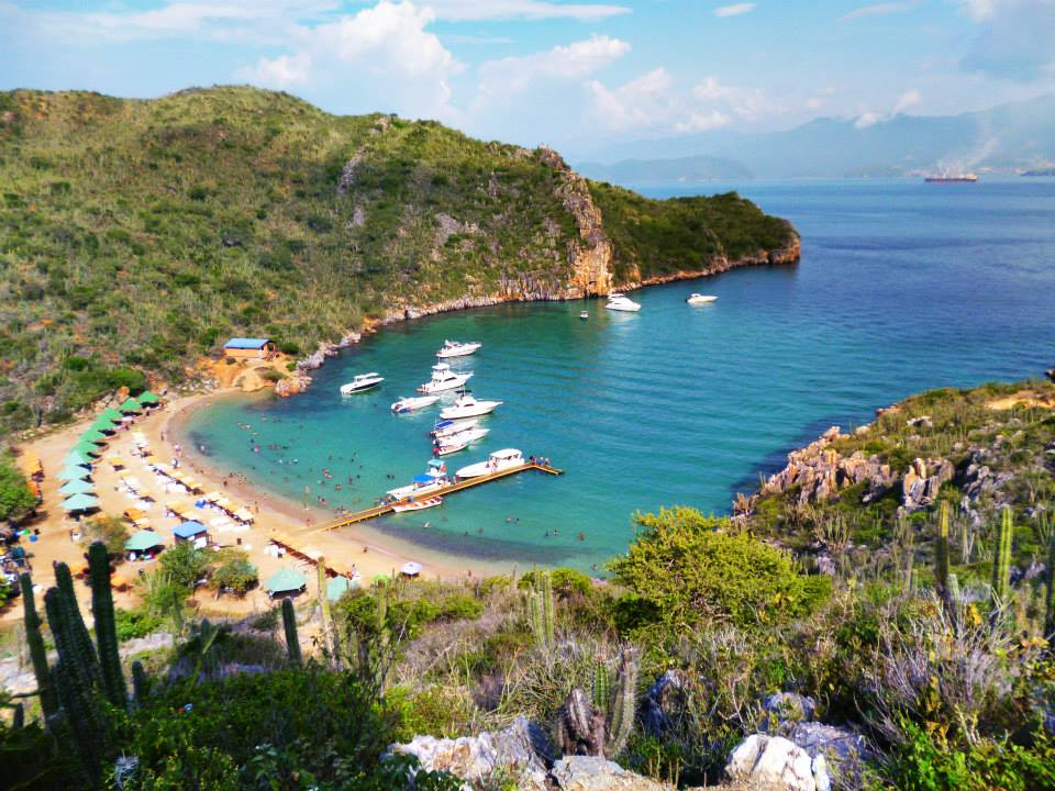 Vista parcial de playa El Faro, perteneciente al Parque Nacional Mochima en el Estado Anzoátegui